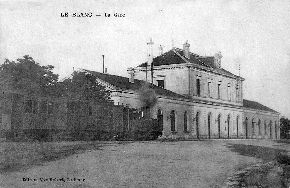 La cour de la gare avec le passage du tacot à voie métrique vers 1910.